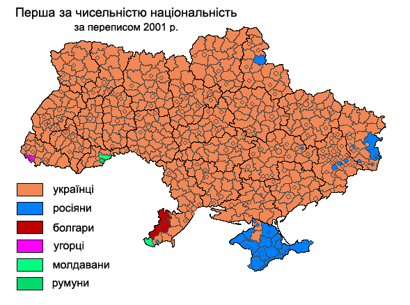 Biggest nationality according to 2001 census: Найбільш чисельна національність за даними перепису 2001 року